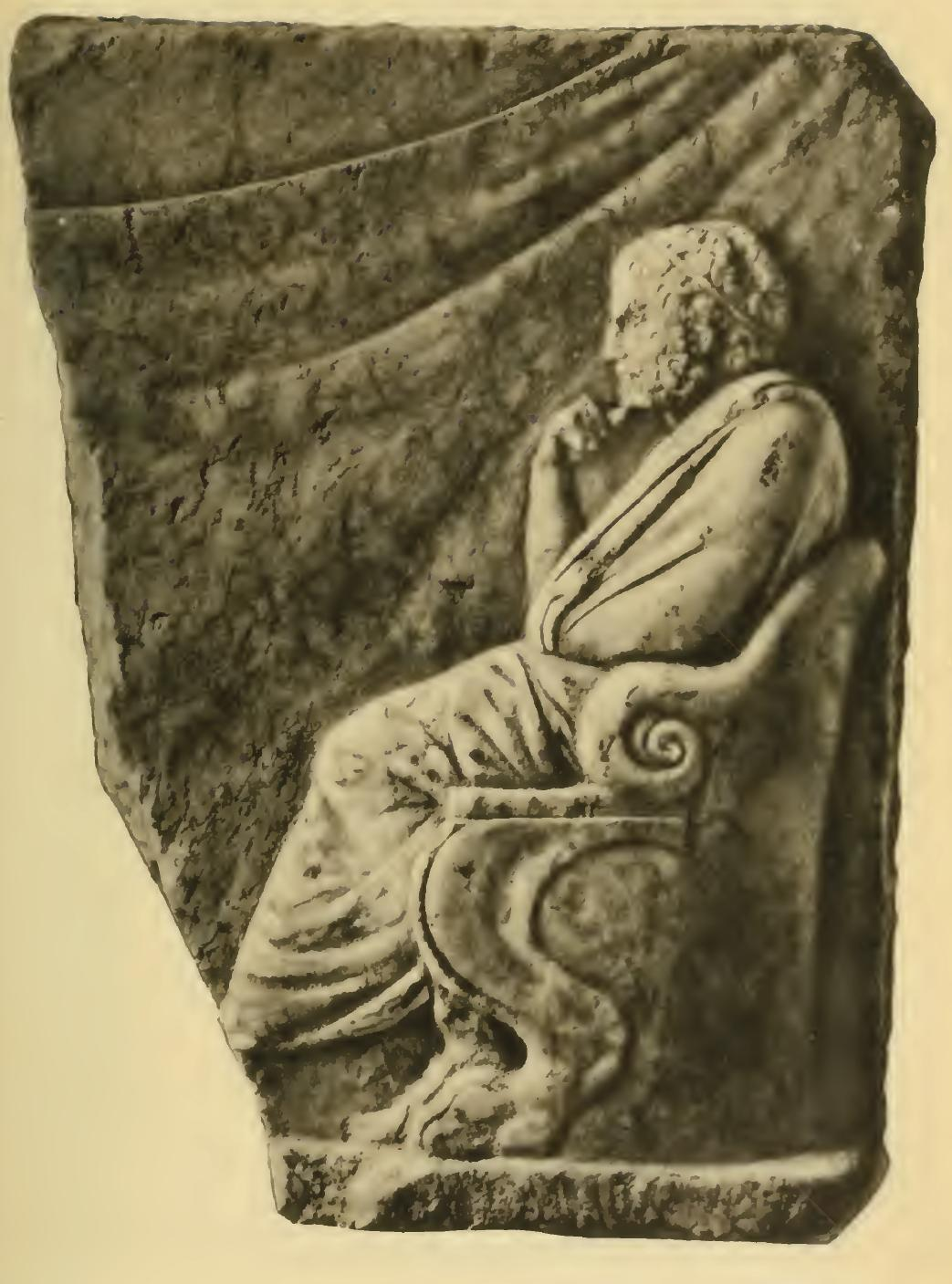 Relief eines Dichters. Gefunden auf Akropolis